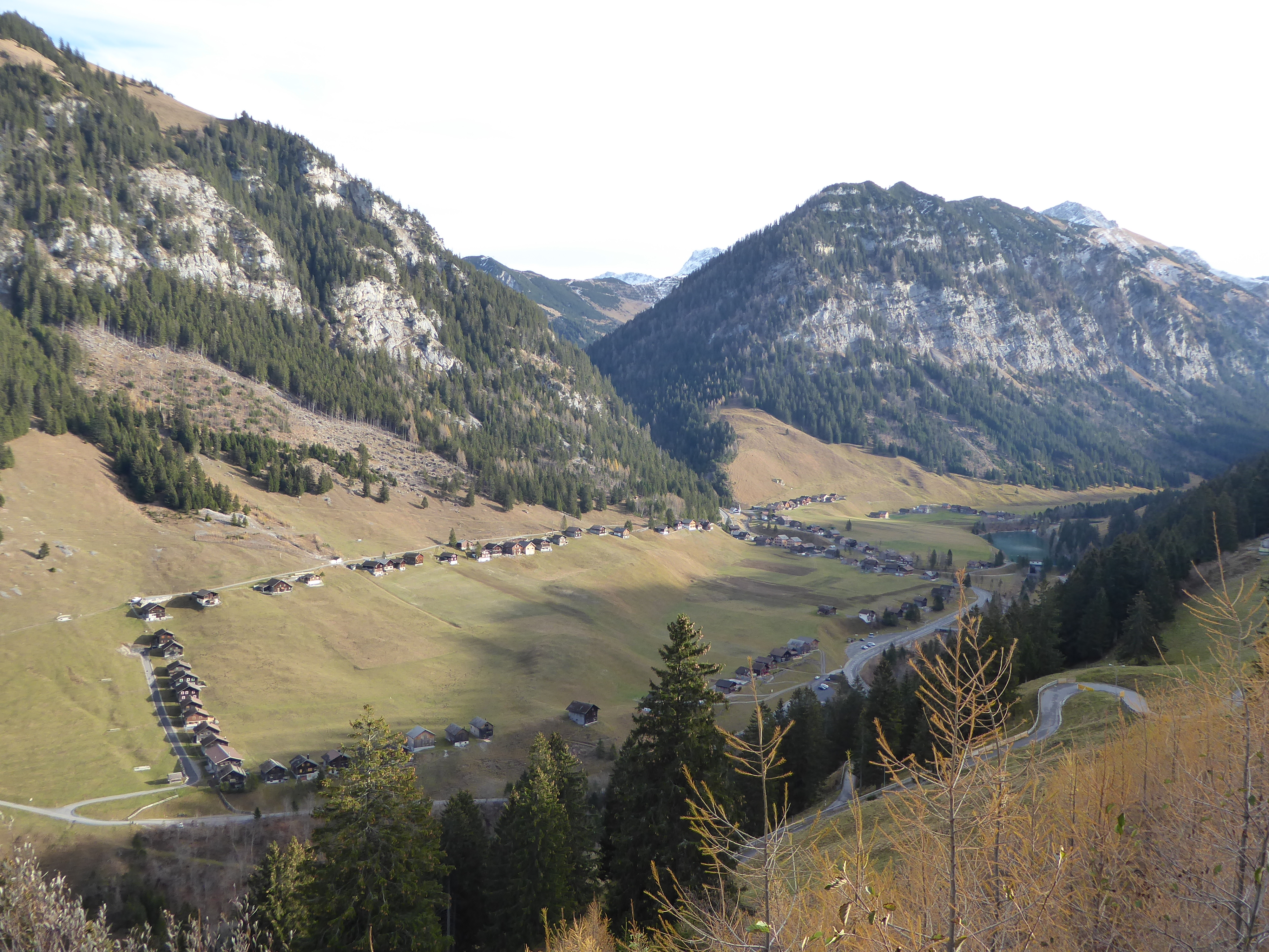 Blick vom Kulm auf Grosssteg